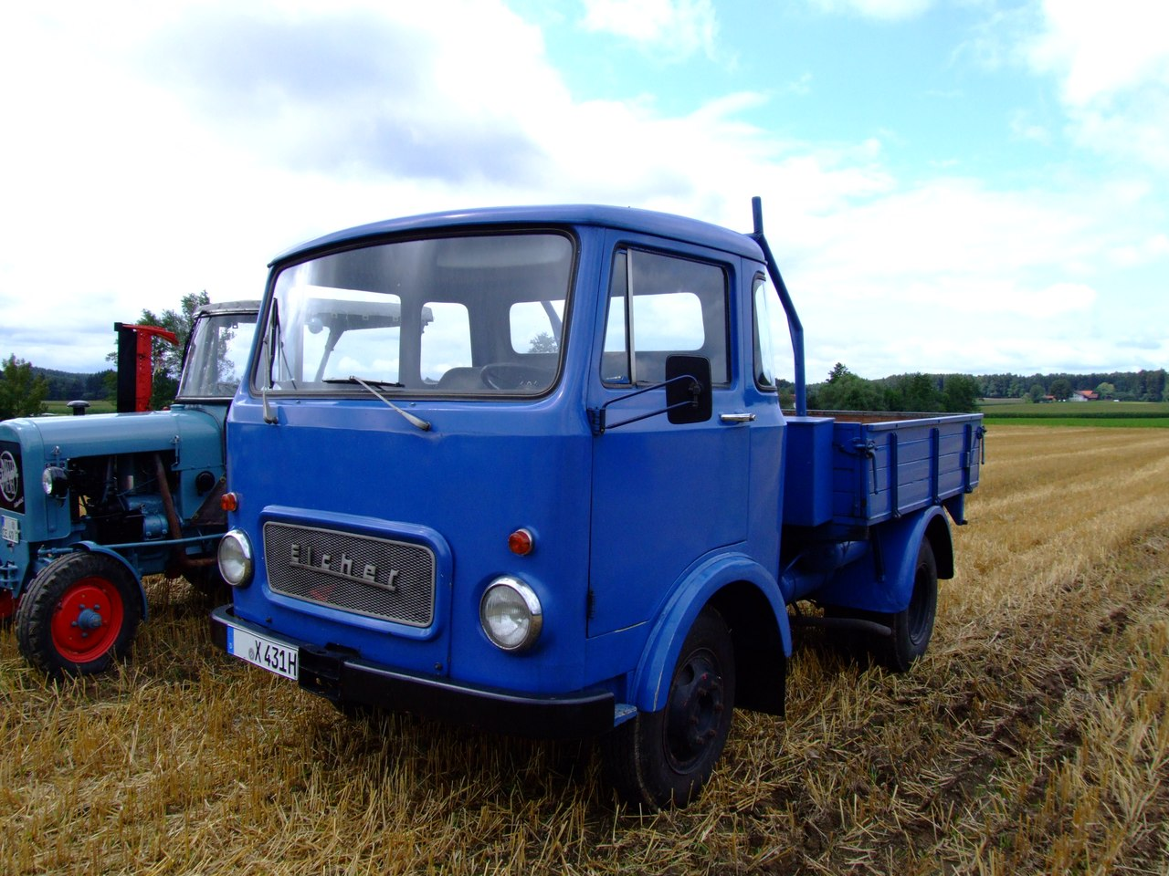 Quelle: selbst fotografiert, 08/2006 Fotograf: Späth Chr. Belastungen lt. Angaben am Fahrzeug: Am Führerhaus, auf der Achse: 1,8 t Am Führerhaus, gleich hinter der Achse: 4 to Auf der Hinterachse: 4,1 to